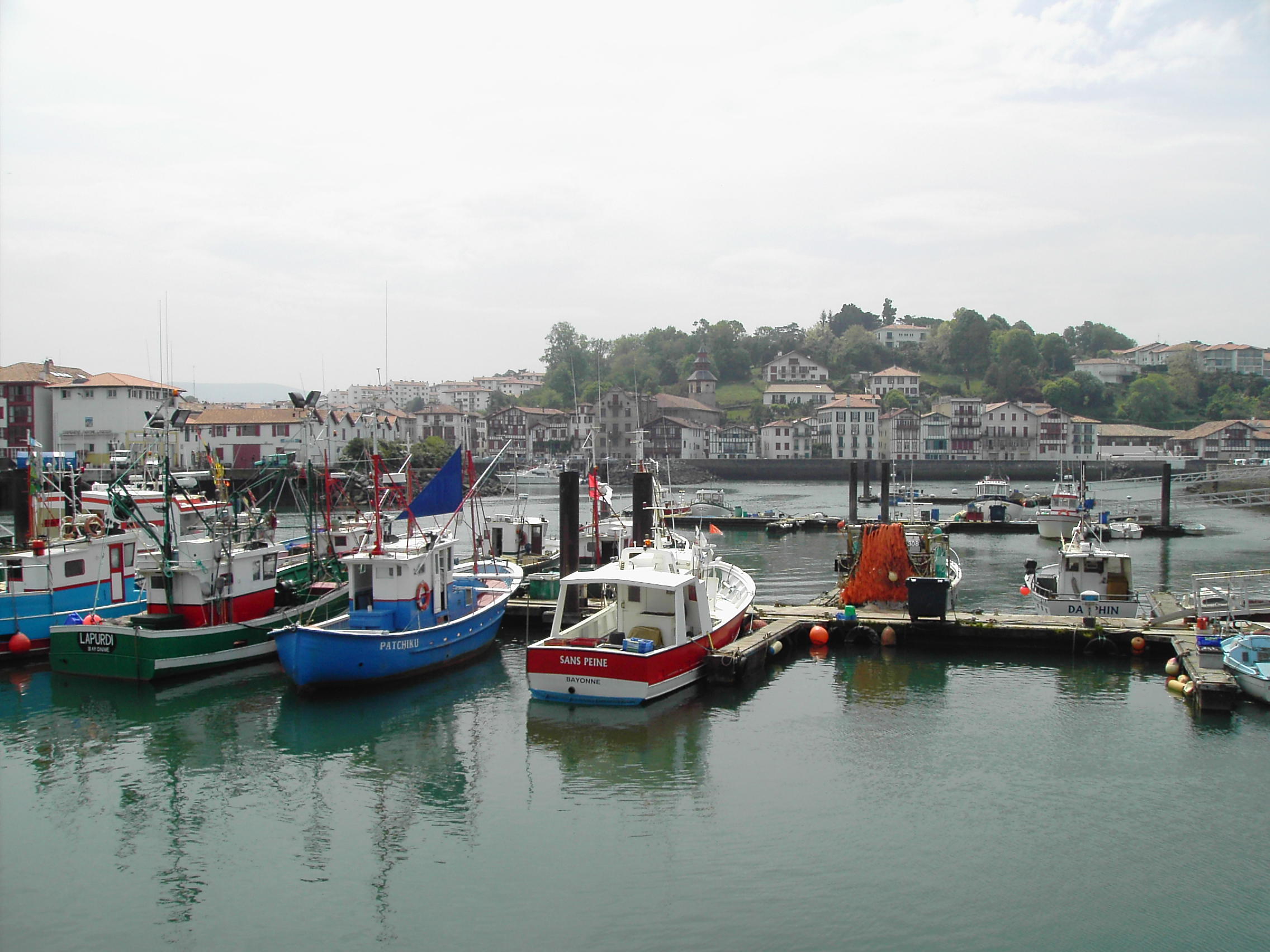 Ciboure, vue du port de St Jean de Luz le 02/01/04 par Harrieta171